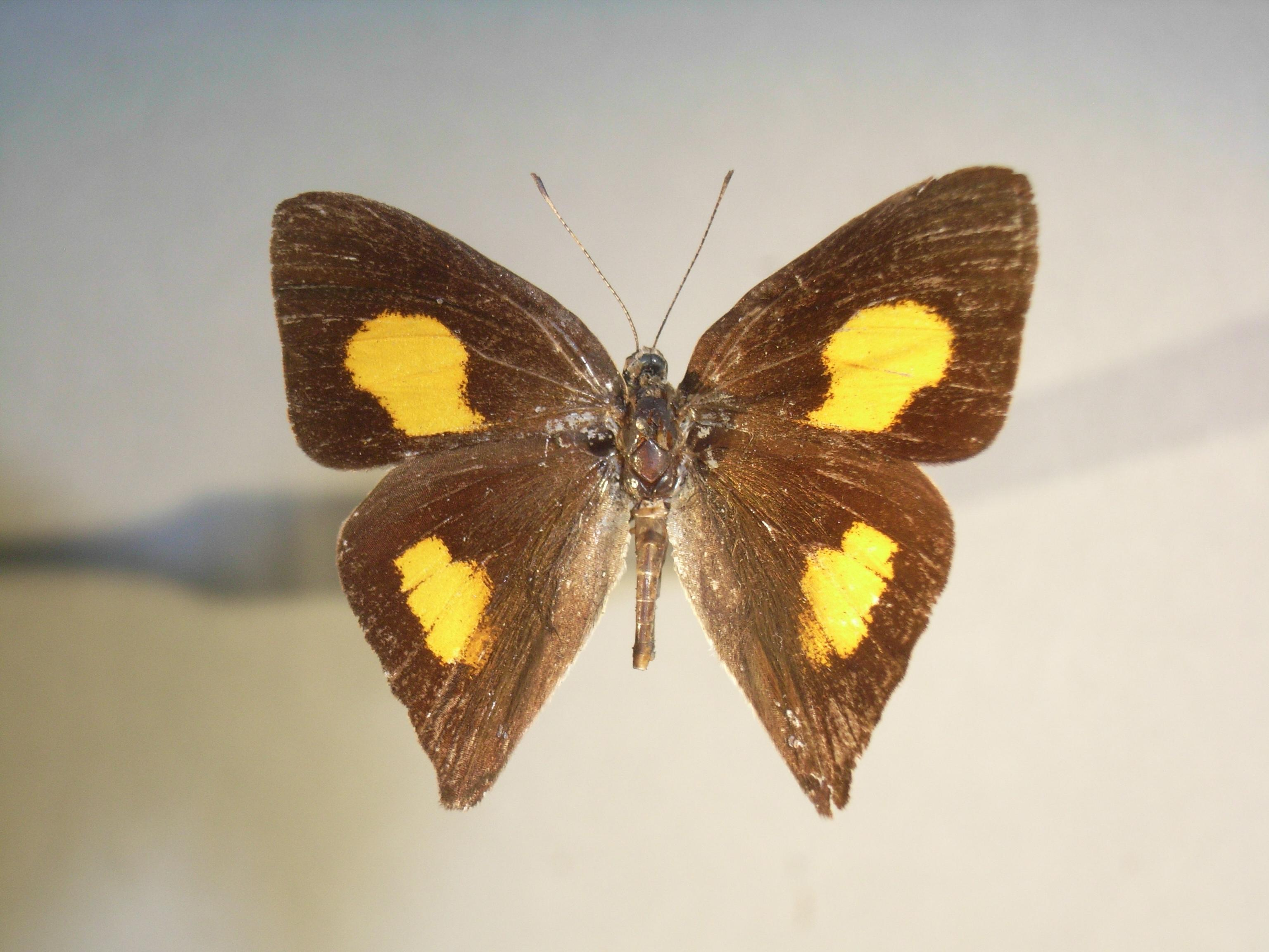 Euselasia thucydides (name's misspelled)